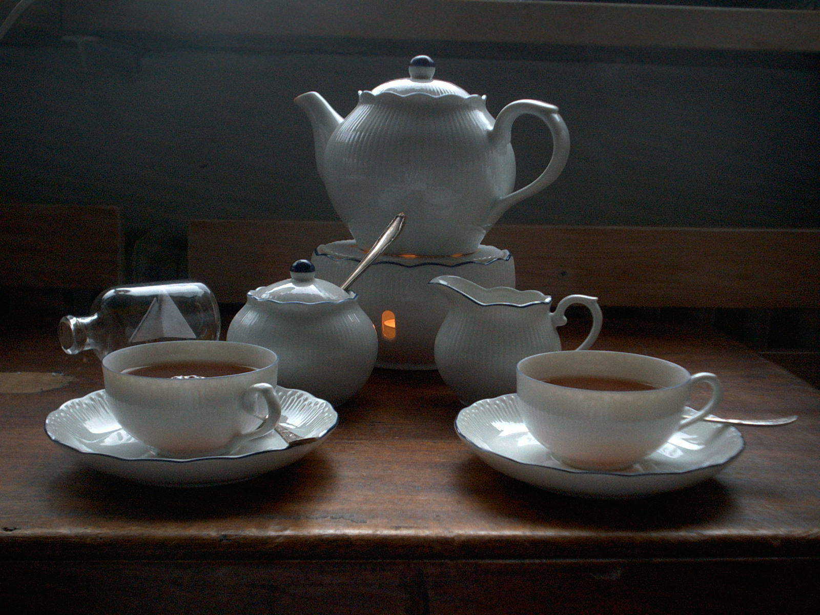 Ostfriesisches Teezubehör, Al-da-Rion